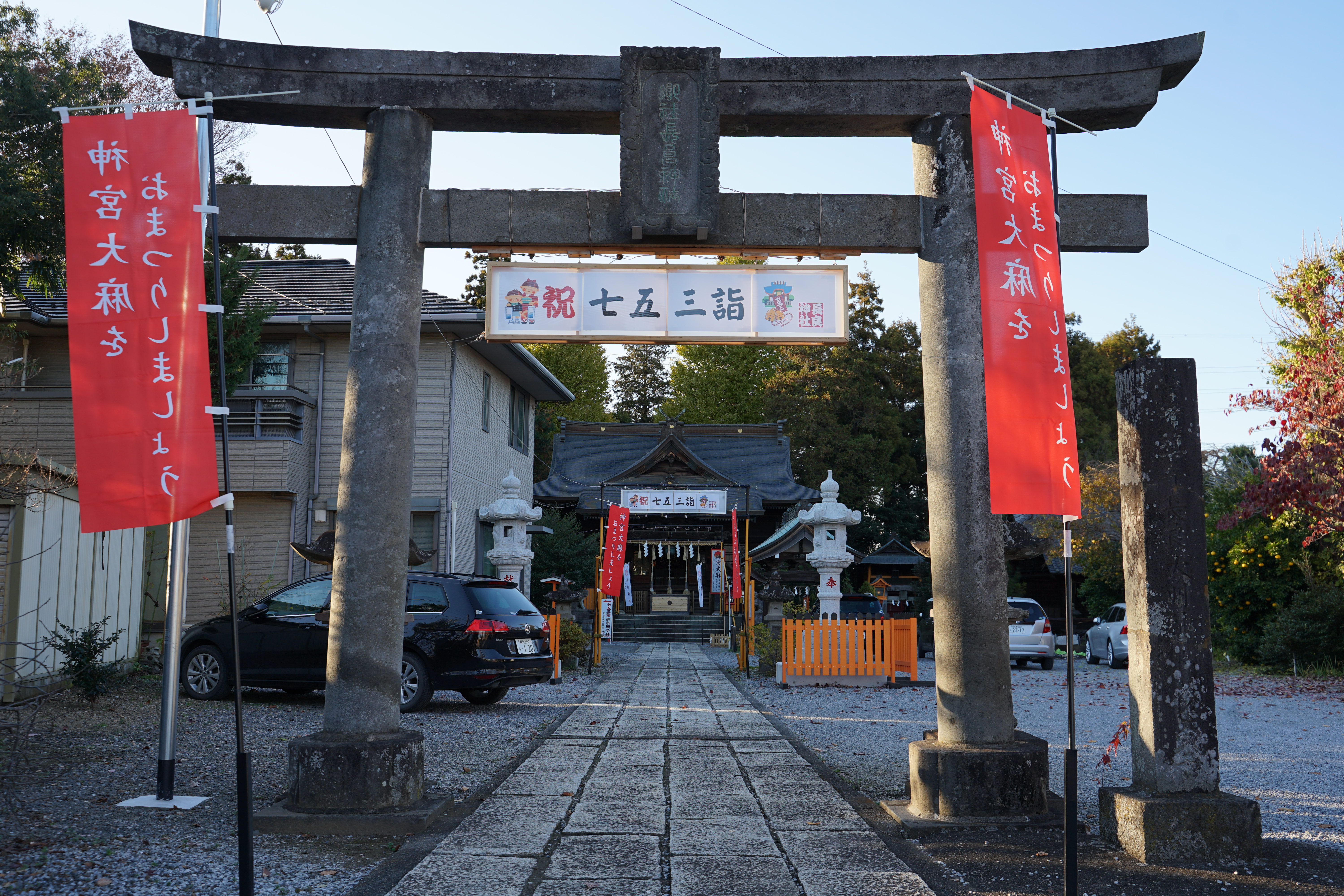 長良神社（群馬県館林市代官町）の鳥居 Sony ILCE-7M2